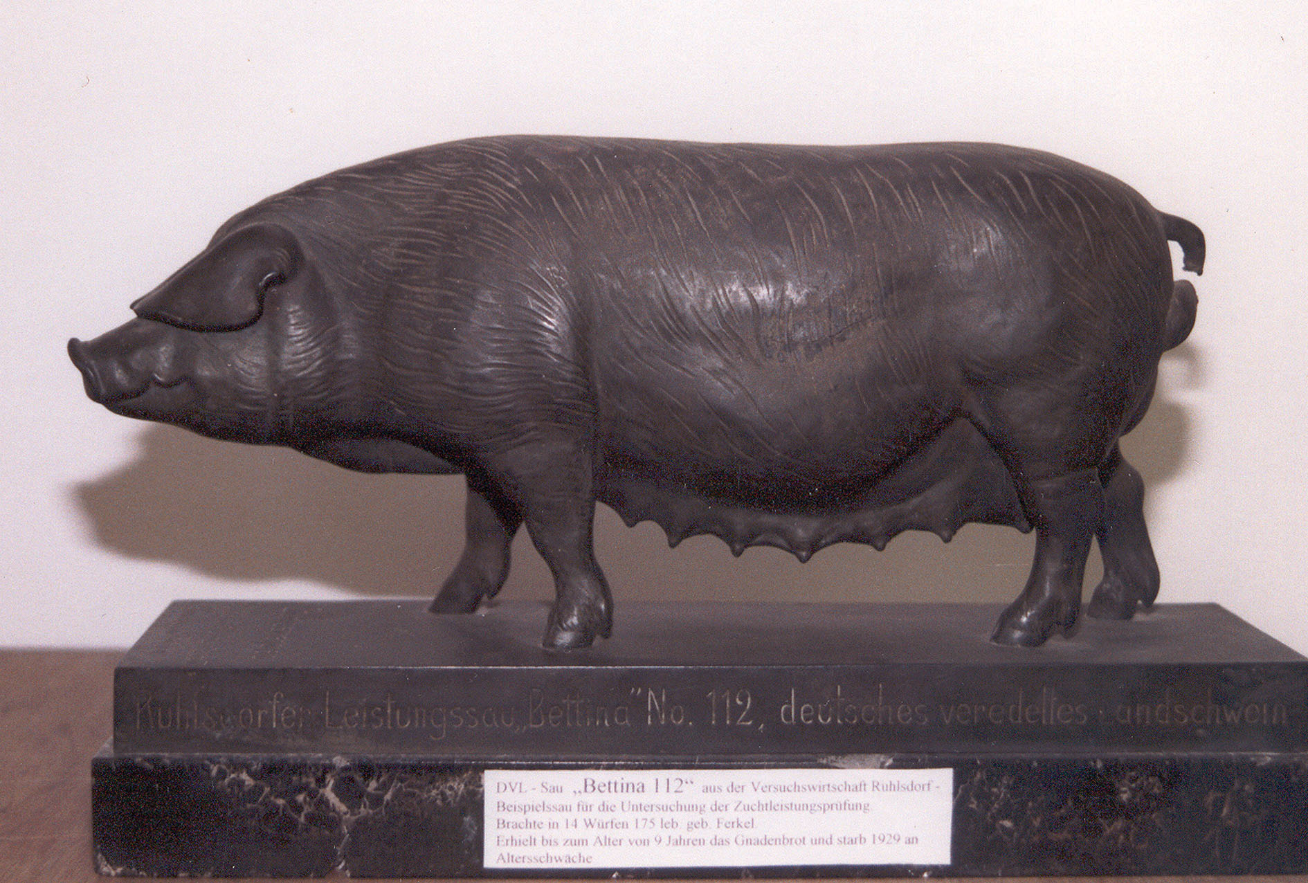 Gipsplastik nach der Natur einer berühmten Zuchtsau des veredelten Landschweins aus der Versuchsanstalt Ruhlsdorf, die als "Mutter der Leistungsprüfung" gilt. Exponat aus dem Deutschen Schweinemuseum Ruhlsdorf.